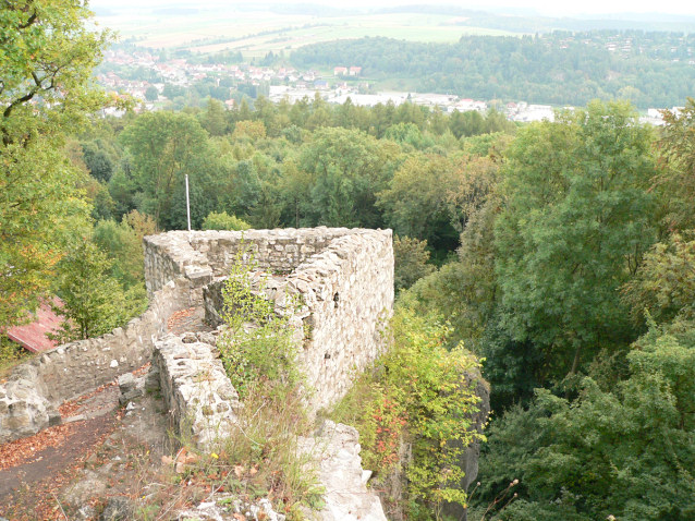 Blick von Burgruine Scharzfels auf Scharzfeld